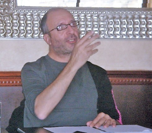 Jean-Claude Michéa, réunion du Mauss, Paris XIVe